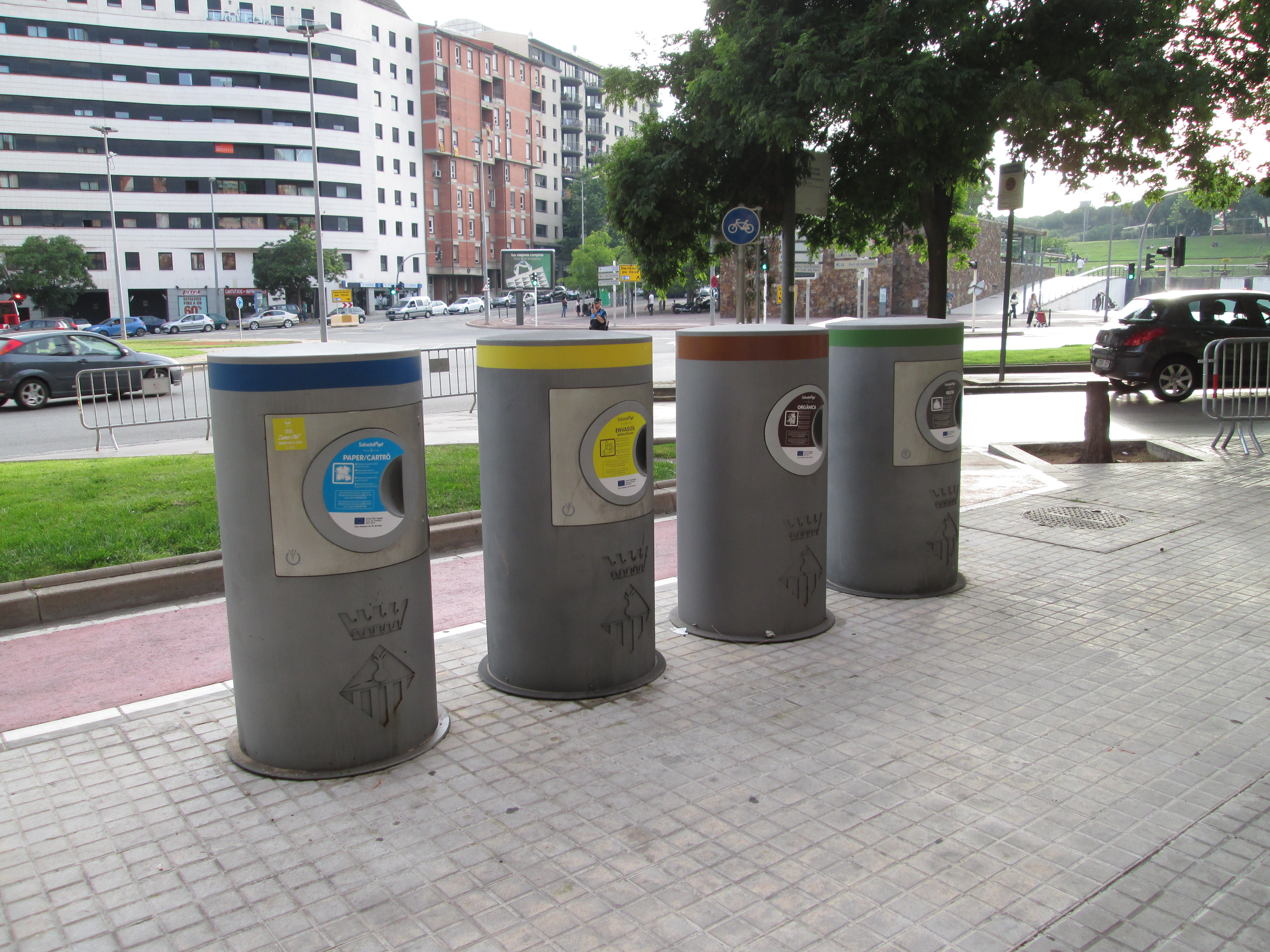 Sistema de recogida neumática de basura de Sabadell. Recogida selectiva: - Buzón azul: papel / cartón. - Buzón amarillo: envases (plásticos / latas). - Buzón marrón: orgánica. - Buzón verde: resto.